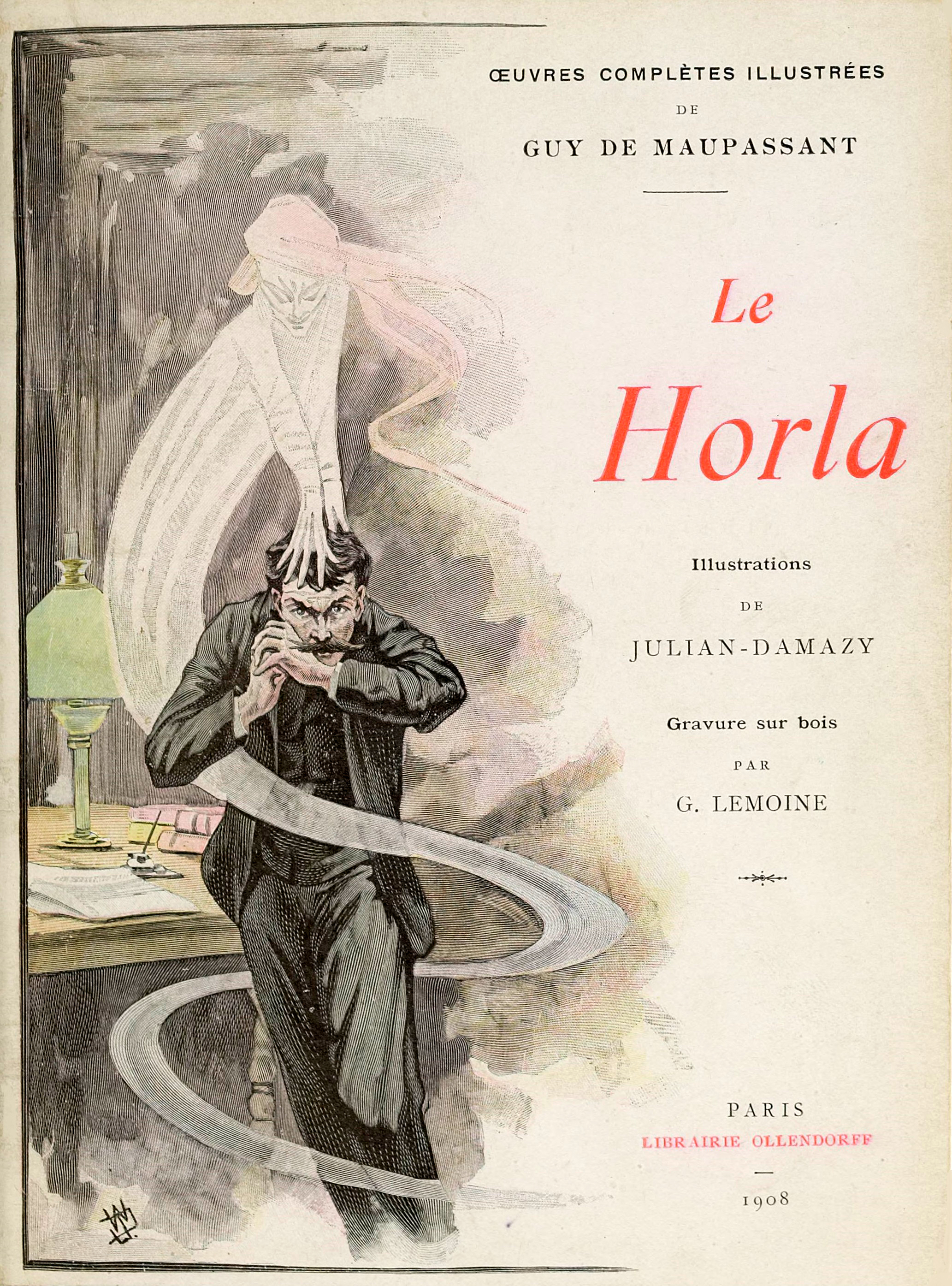 Couverture d'une édition de 1908 du recueil de Maupassant Le Horla, illustrée par des dessins de William Julian-Damazy (1865-1910). Gravure sur bois de Gorges Lemoine.